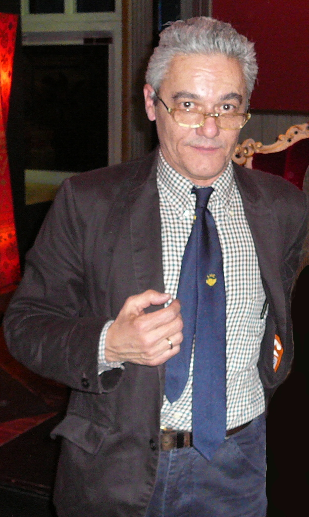 Aldo Spinelli